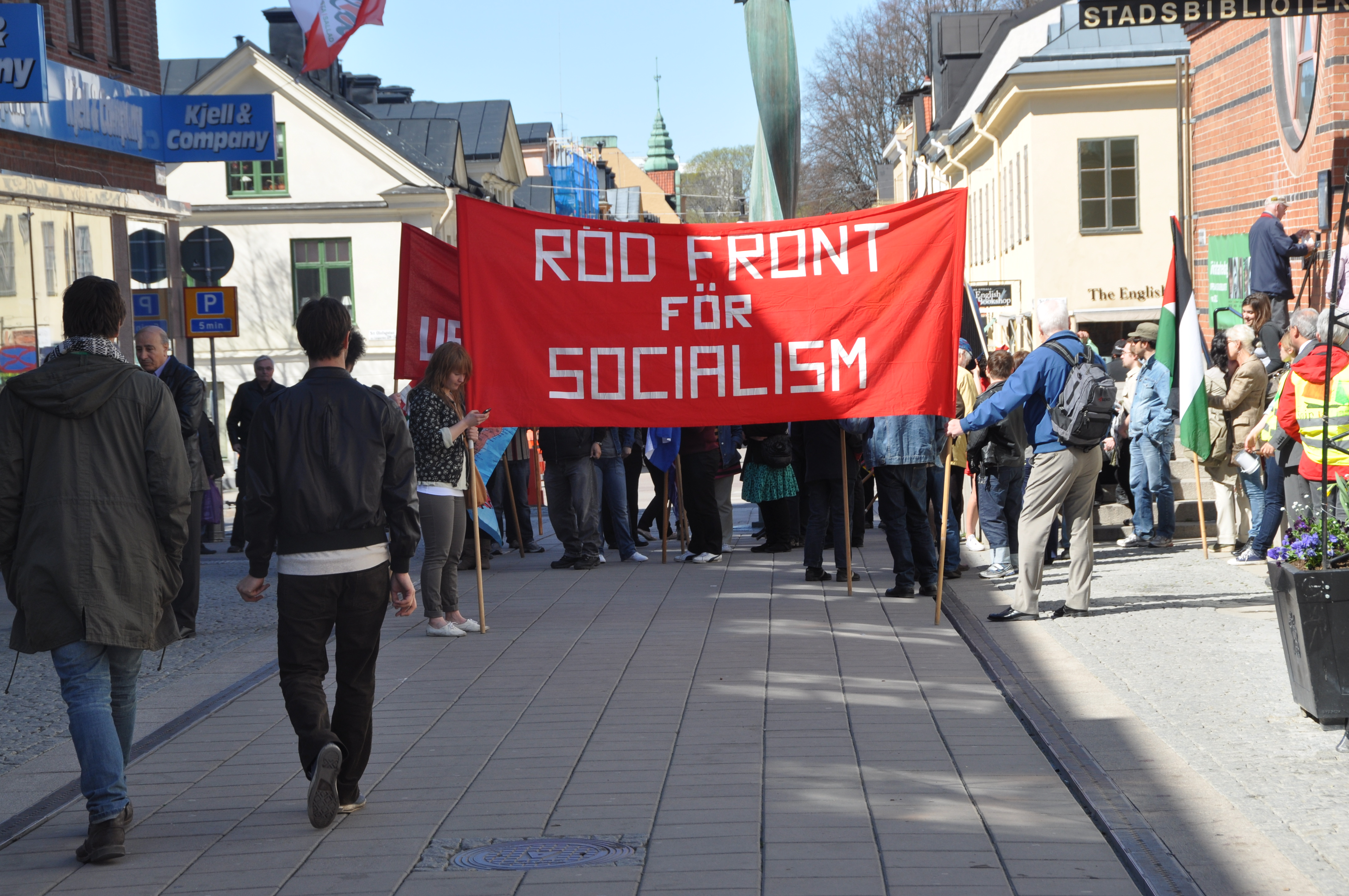 Kommunistiska partiet, Uppsala, 1a maj 2012